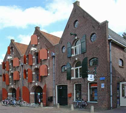 Het arsenaal van Coevorden